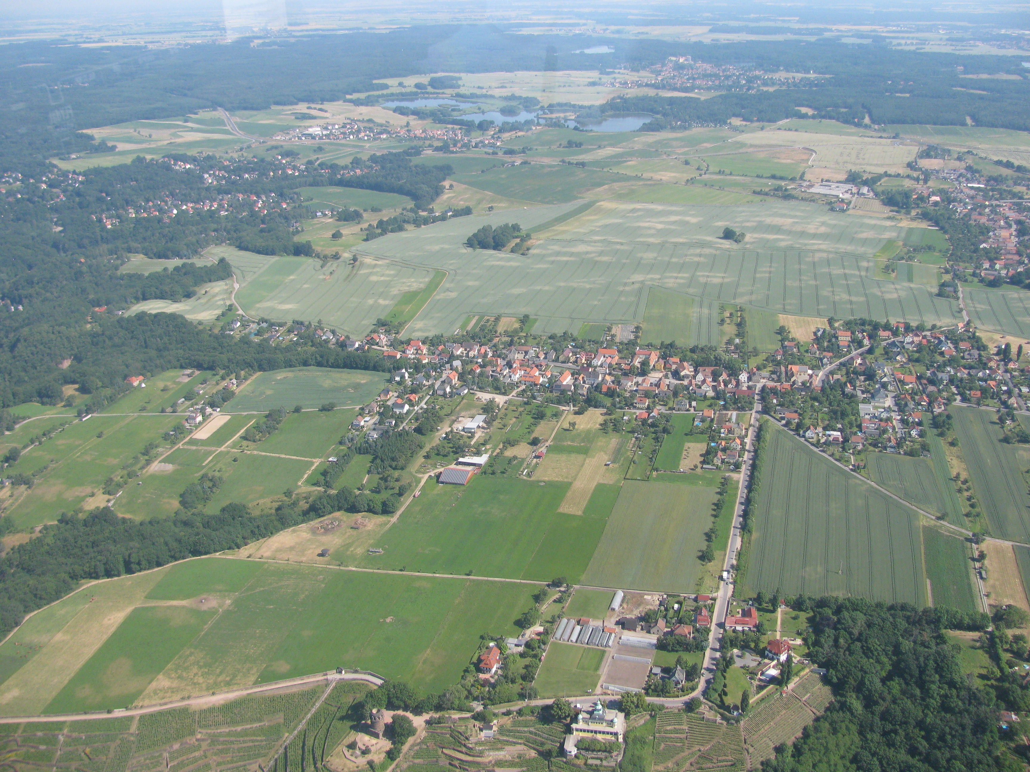 Luftbild Radebeul-Wahnsdorf